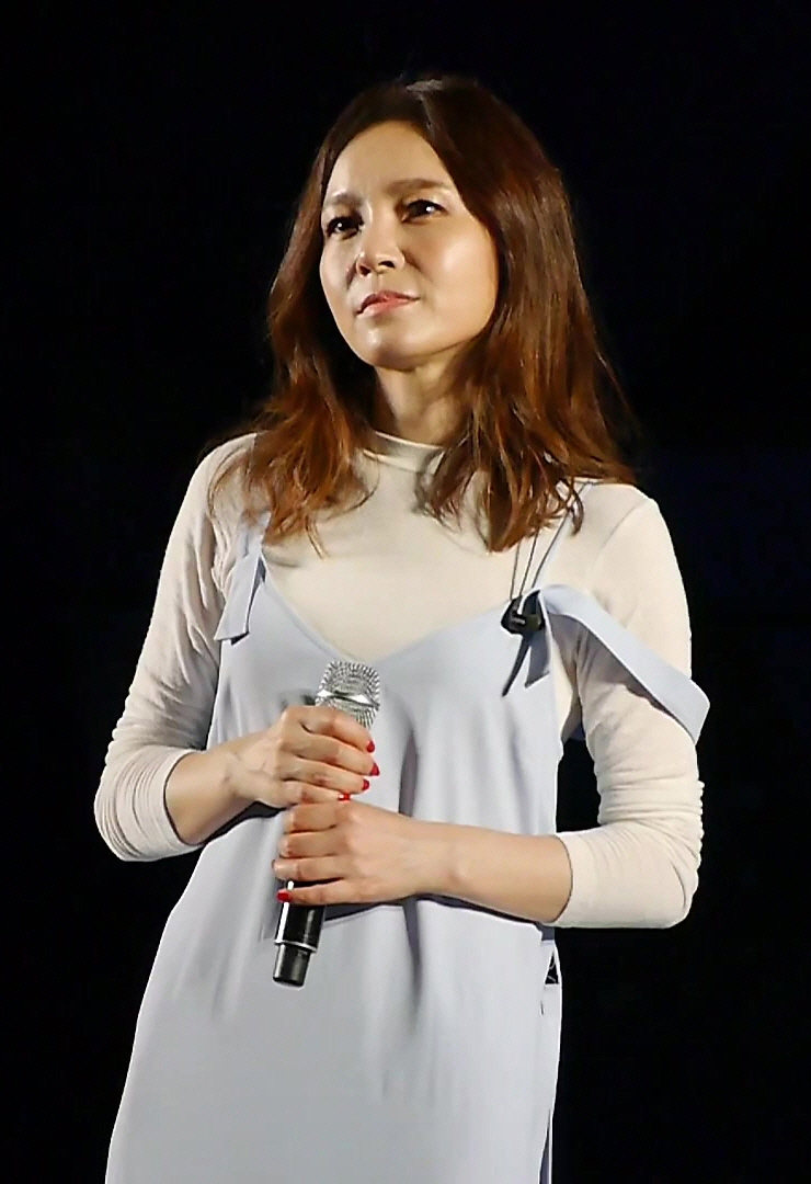 160708 서울광장 착한콘서트 왁스 WAX 직캠 화장을 고치고